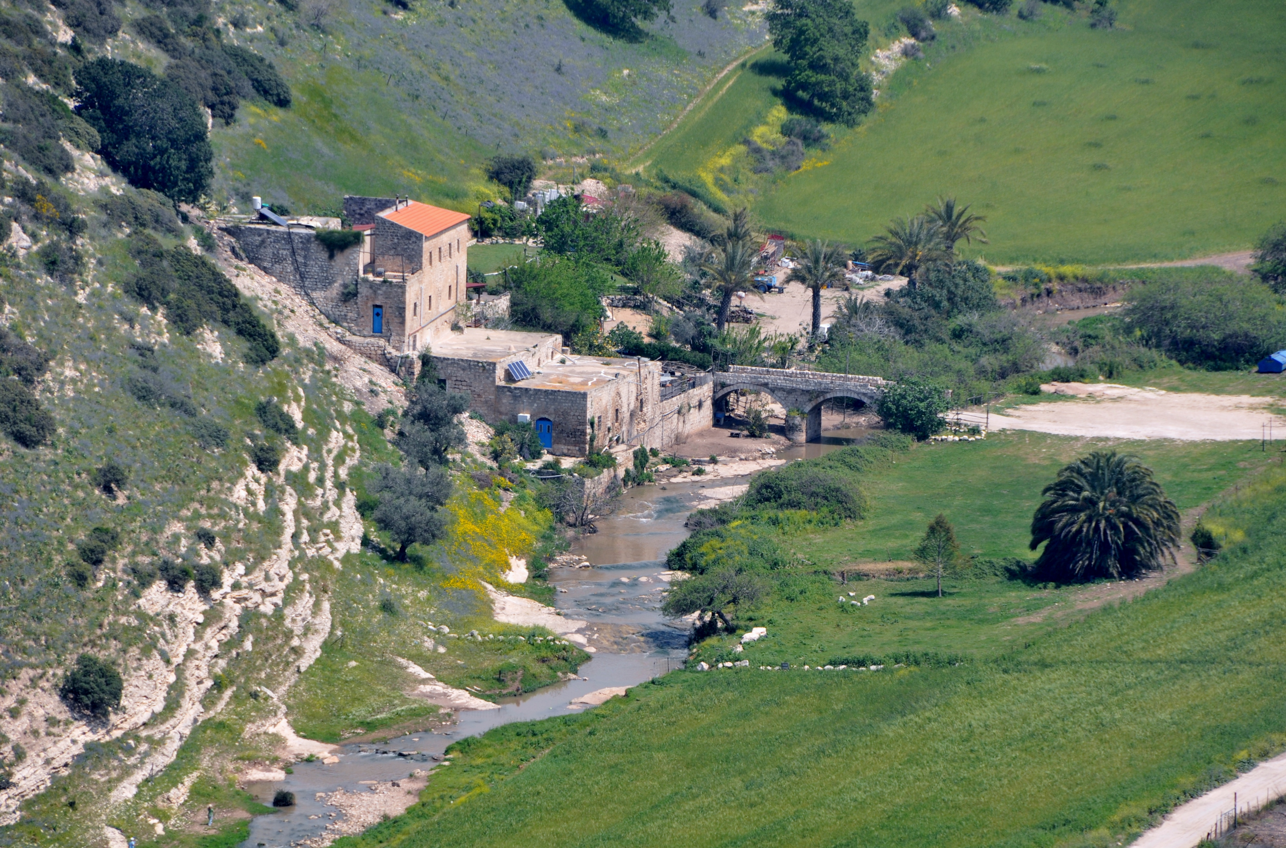 טחנת הקמח נחל ציפורי